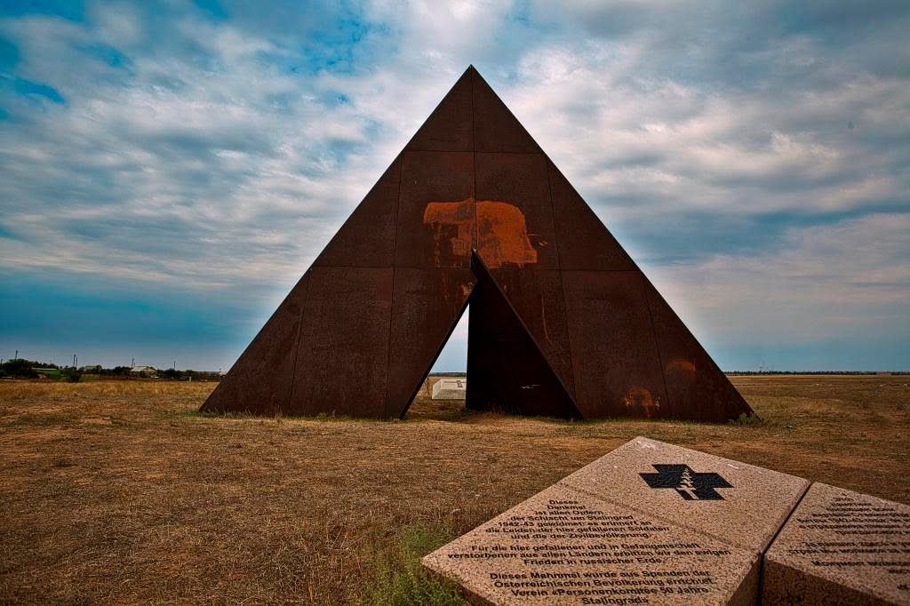 Мемориал на окраине посёлка Песчанка. Волгоград, Советский район.